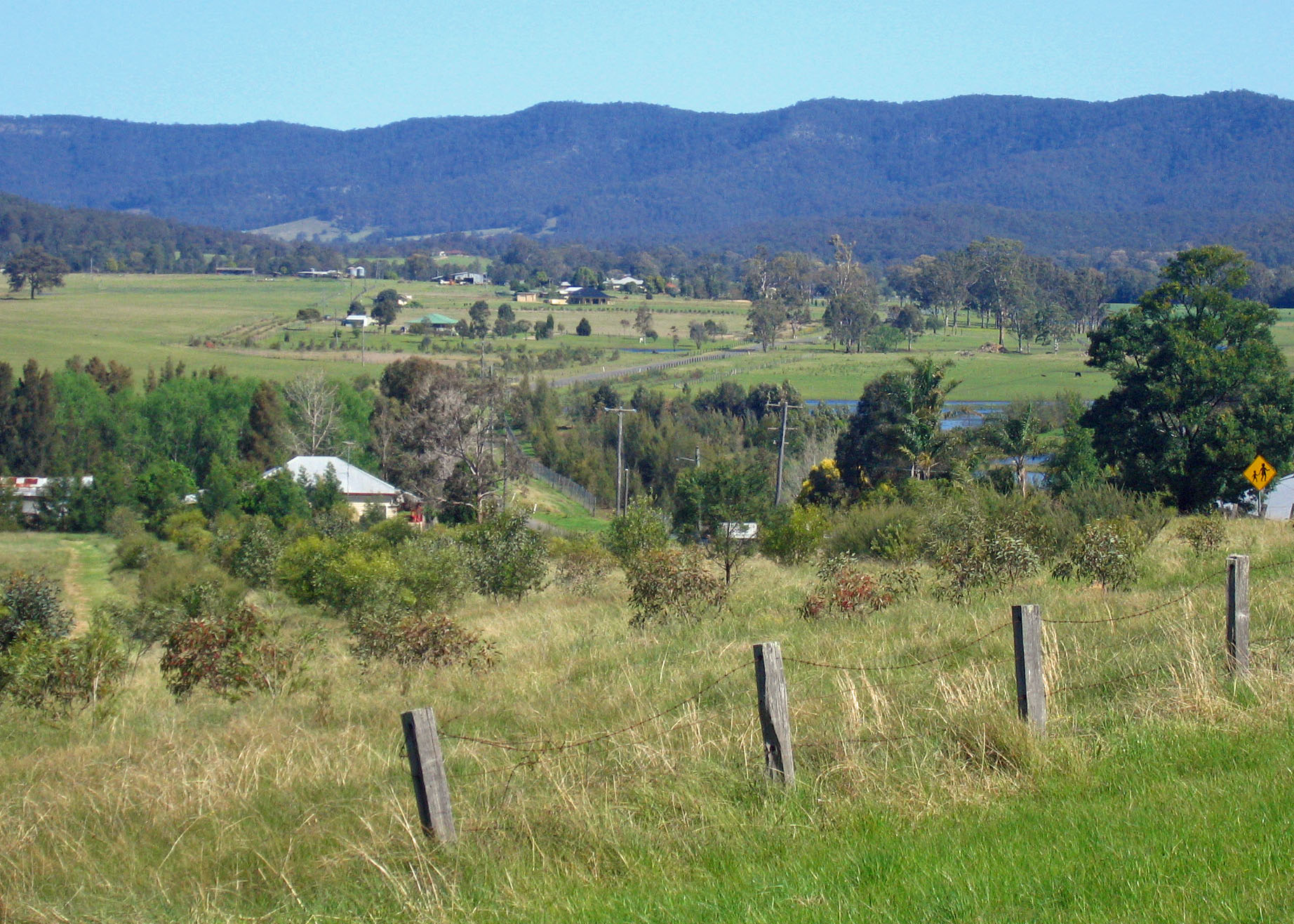 View down Congewai Creek valley